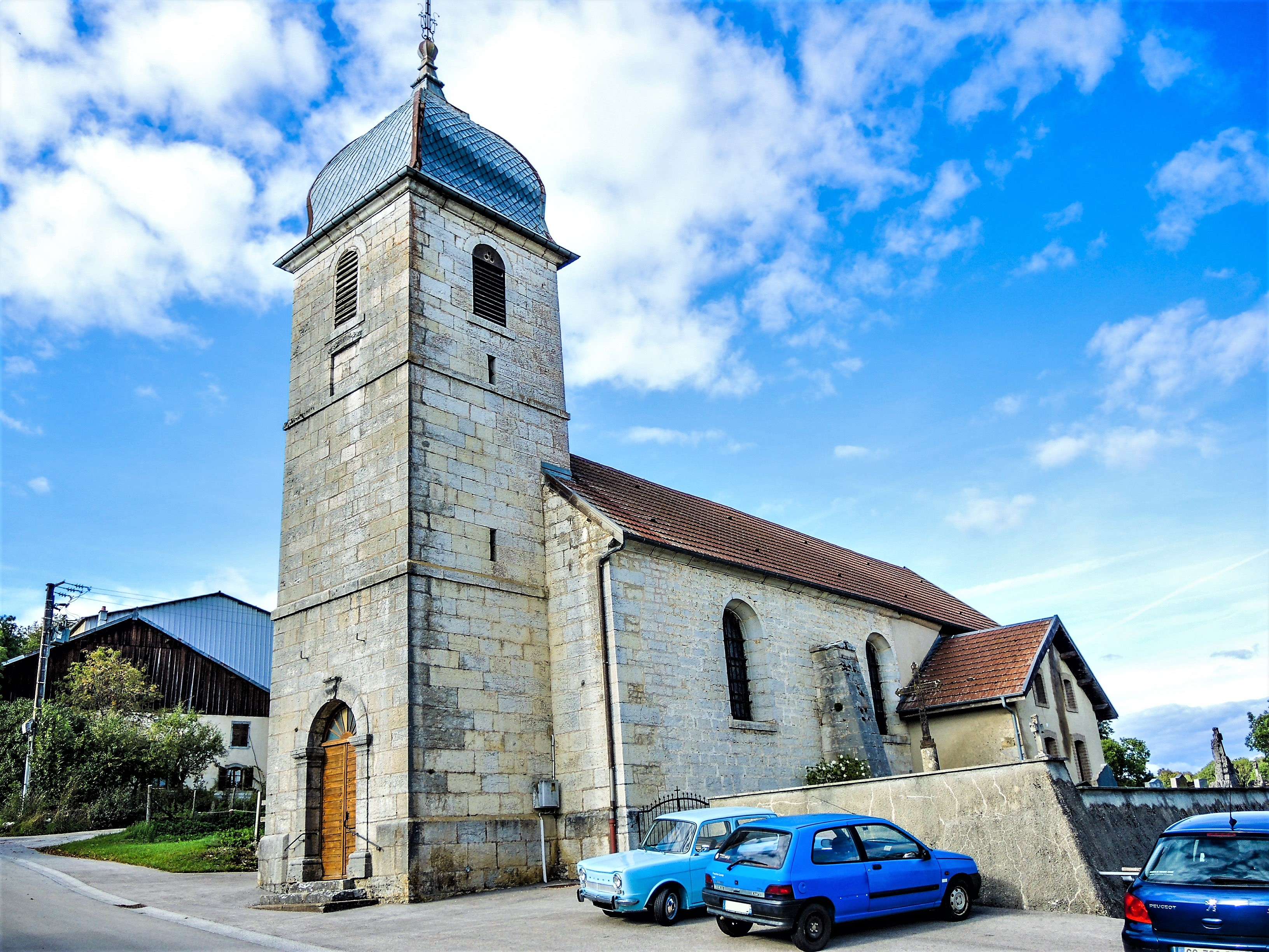 Eglise de Longechaux